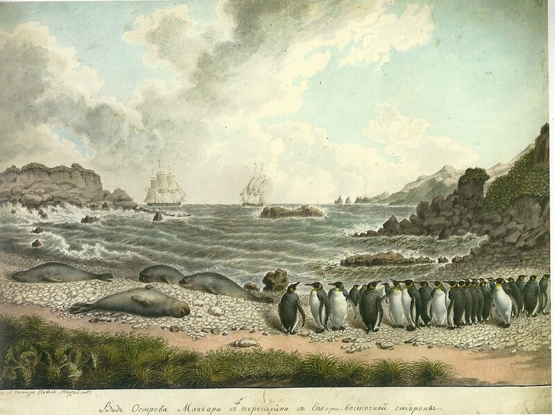 Михайлов Павел Николаевич - Вид острова Маквари с перешейка с северо-восточной стороны